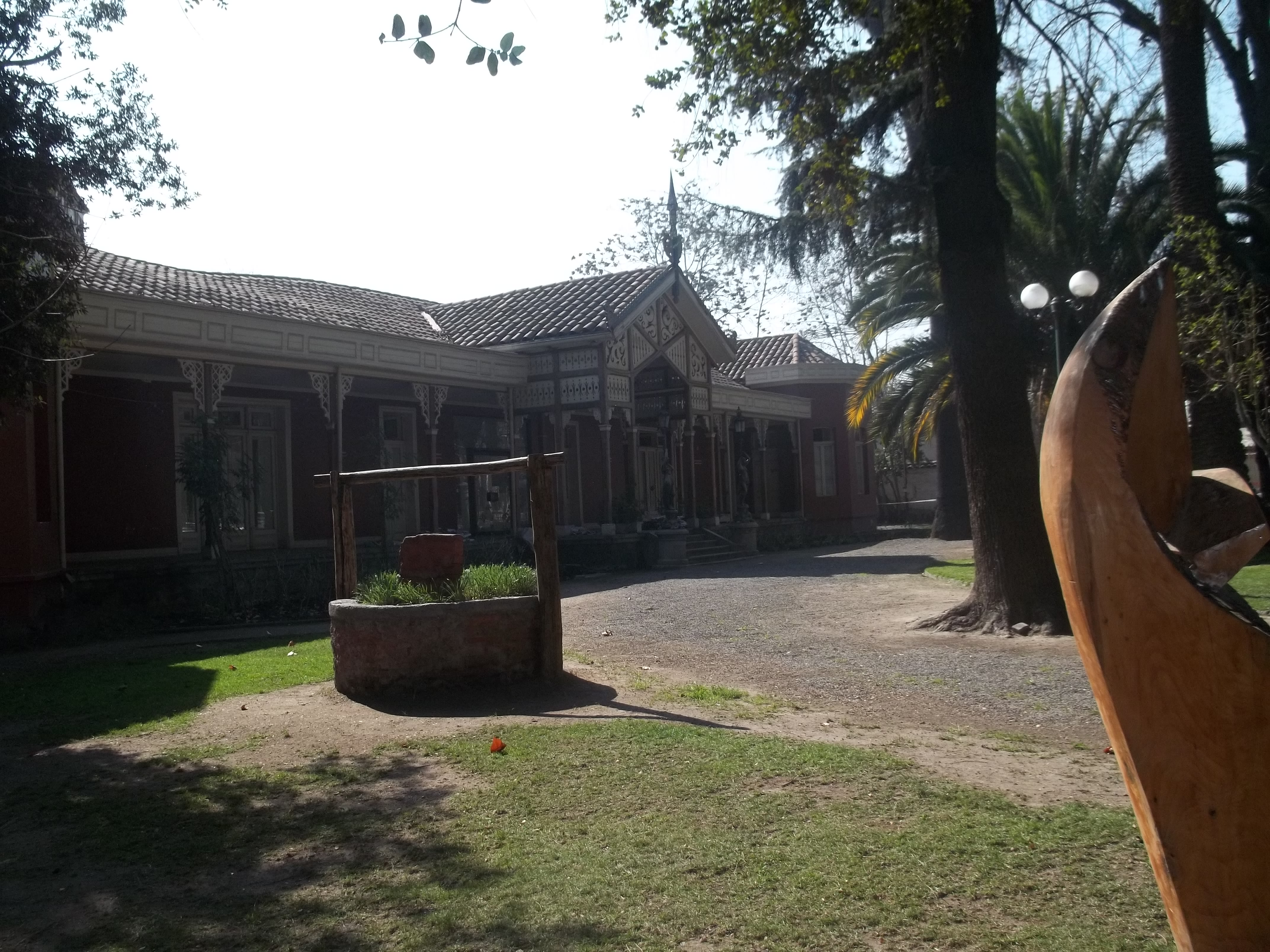 casa de la cultura de snabdo